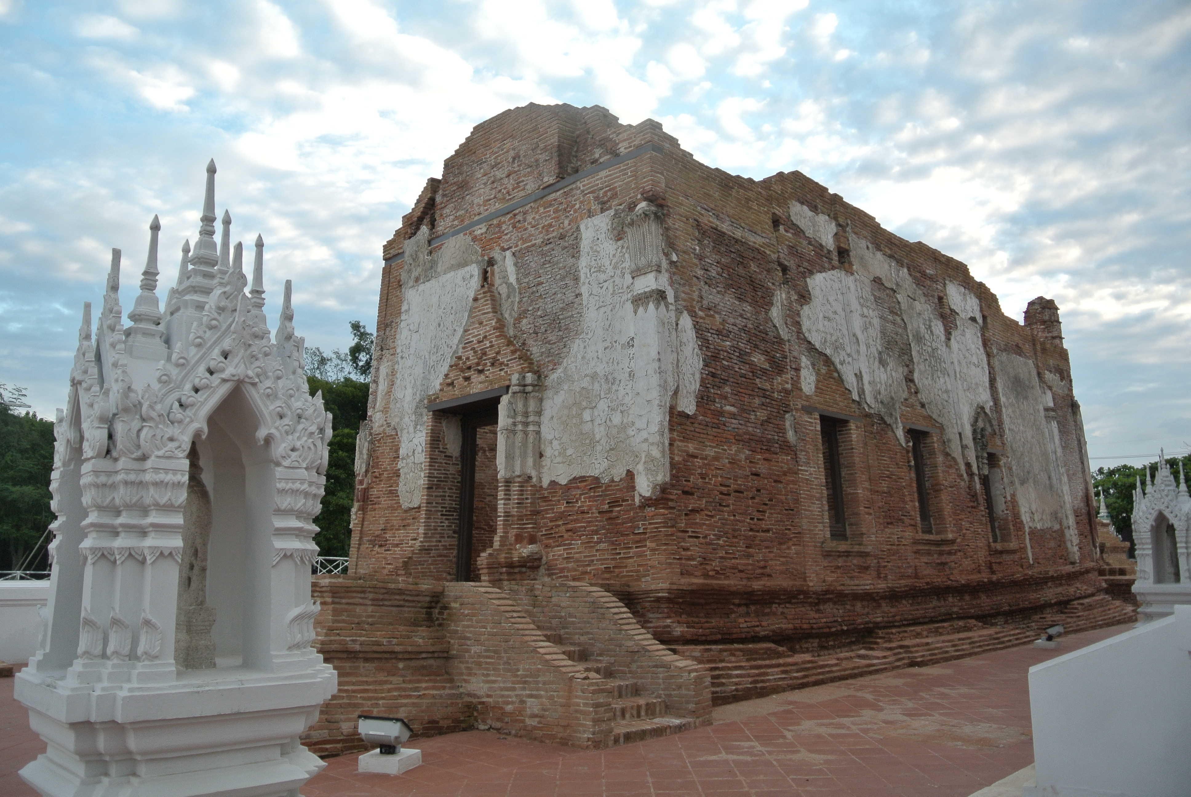 วัดใหญ่จอมปราสาท ท่าจีน เมืองสมุทรสาคร ทะเบียน 7401-02-0001